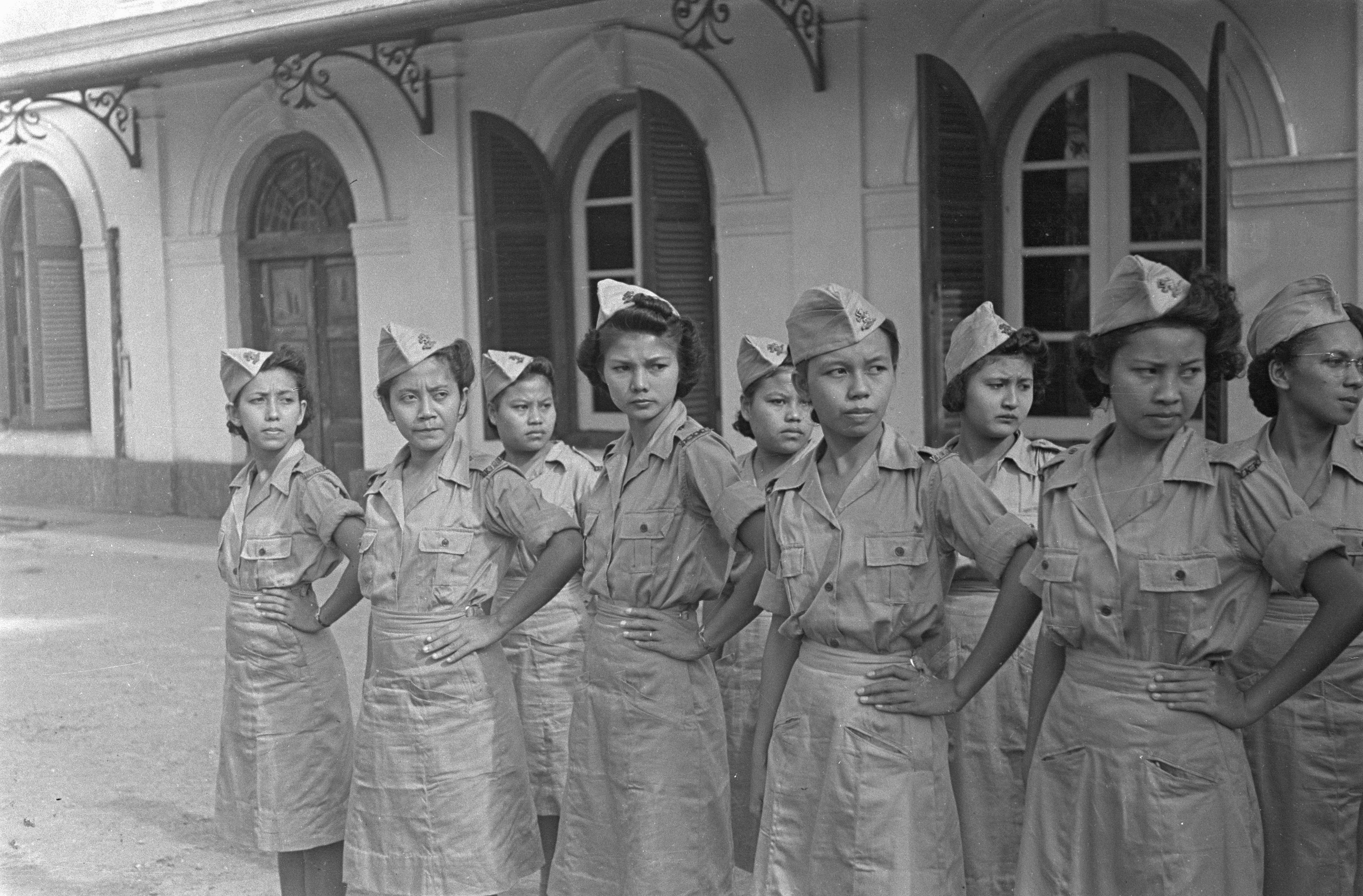 Collectie / Archief : Fotocollectie Dienst voor Legercontacten Indonesië Reportage / Serie : [ onbekend ] Beschrijving : Leden Vrouwenkorps KNIL "richten" Datum : 1947/01/01 Locatie : Indonesië, Nederlands-Indië Fotograaf : Fotograaf Onbekend / DLC Auteursrechthebbende : Nationaal Archief Materiaalsoort : Negatief (zwart/wit) Nummer archiefinventaris : bekijk toegang 2.24.04.02 Bestanddeelnummer : 6707